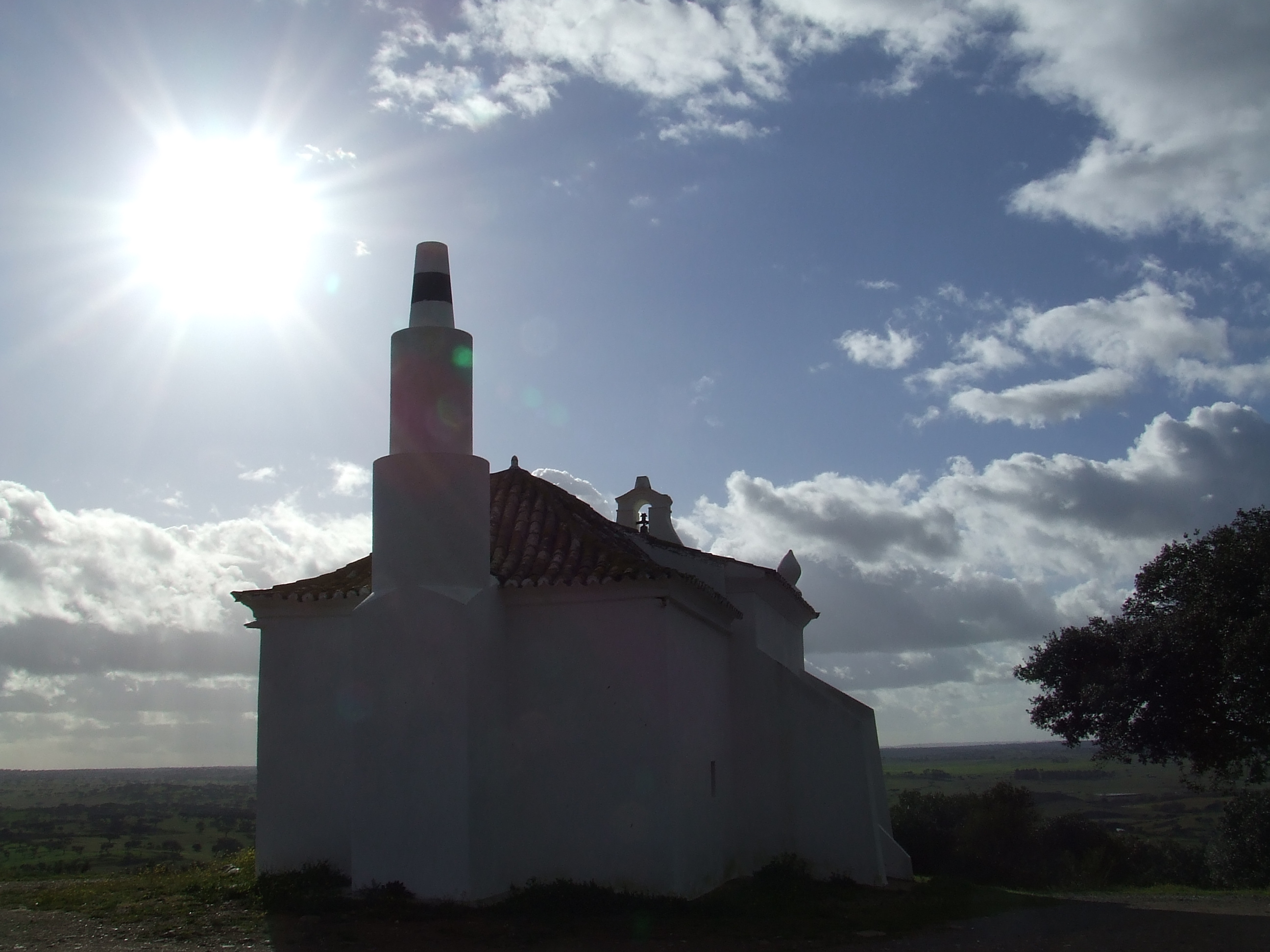 Chapel of S. Pedro de Cabeças 2